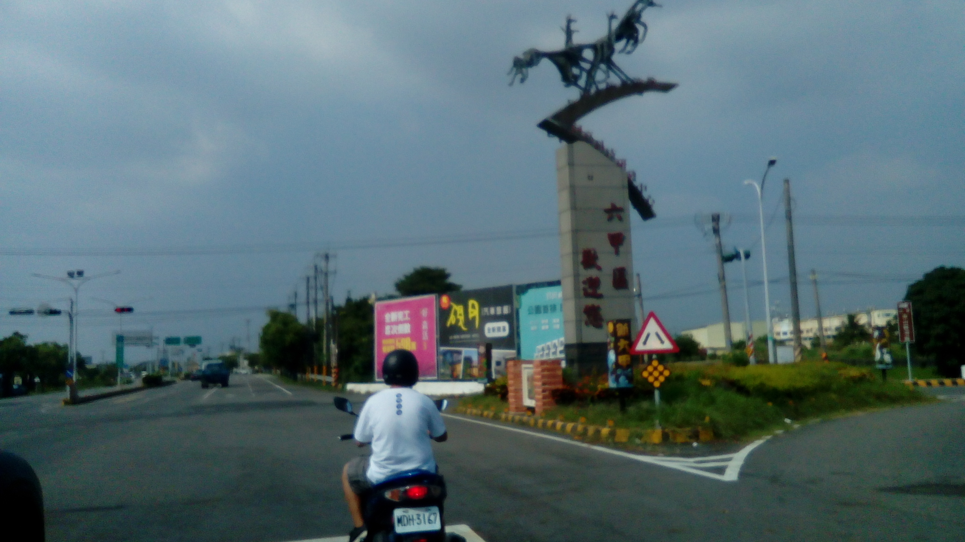 位於台一線上 林鳳營一帶 六甲與官田的交界處